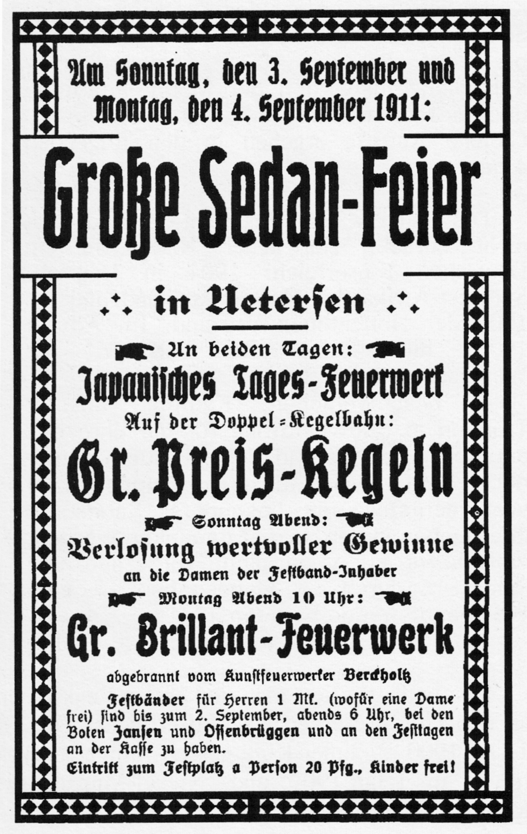 Zeitungsaunzeige für die Sedanfeier in Uetersen vom 3. bis 4. September 1911